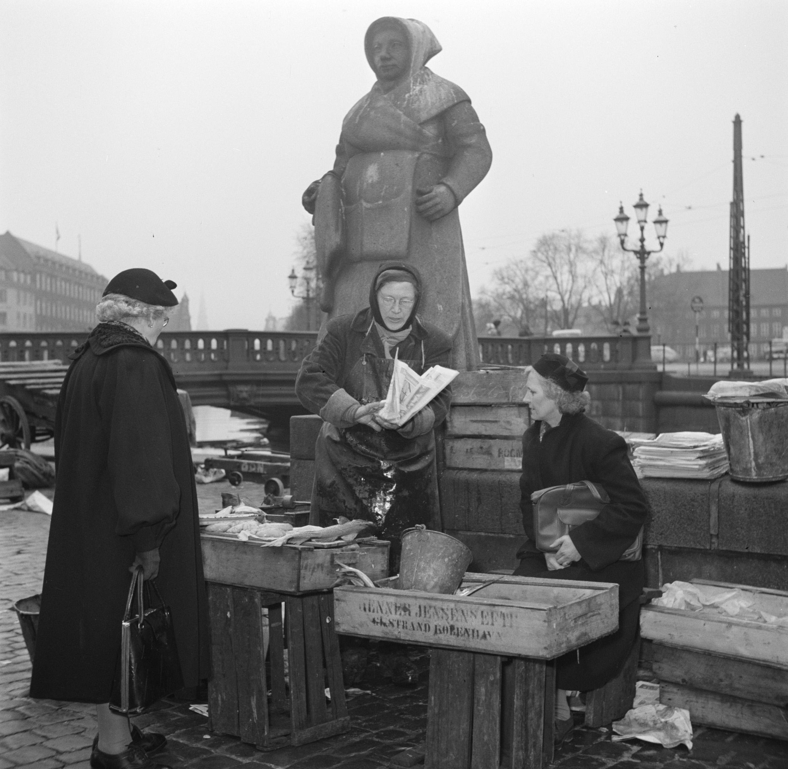 Collectie / Archief : Fotocollectie Van de Poll Reportage / Serie : Markt in Kopenhagen Beschrijving : Vrouwen bij hun koopwaar op de vismarkt in Kopenhagen met op de achtergrond een standbeeld van een vissersvrouw Datum : maart 1954 Locatie : Denemarken, Gammel Strand, Kopenhagen Trefwoorden : beeldhouwwerken, bezoekers, gebouwen, kranten, markten, marktkooplui, standbeelden, straatbeelden, vissen Fotograaf : Poll, Willem van de, [onbekend] Auteursrechthebbende : Nationaal Archief Materiaalsoort : Negatief (zwart/wit) Nummer archiefinventaris : bekijk toegang 2.24.14.02 Bestanddeelnummer : 252-8836